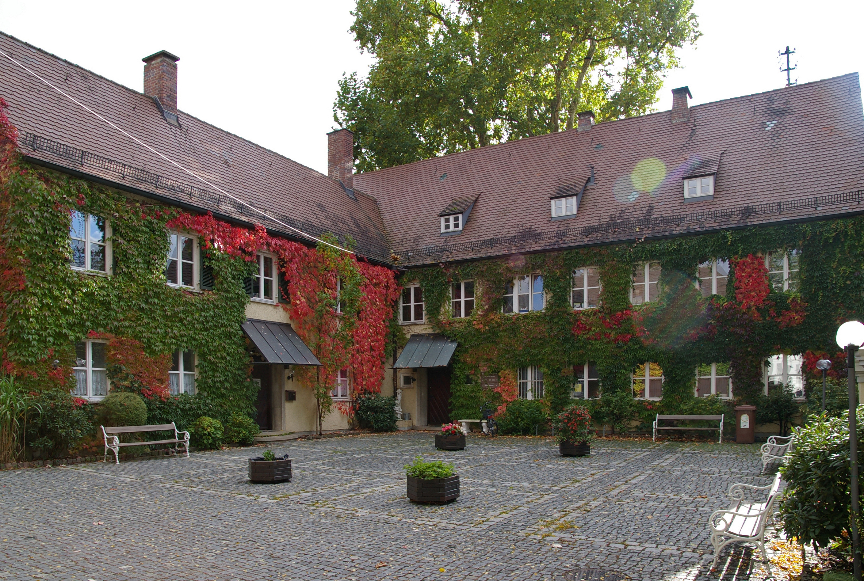 Ehem. Schloss, sog. Fuggerschlösschen, später Rathaus, zweiflügelige Anlage aus zweigeschossigen Satteldachbauten und nördlicher Verbindungsmauer mit Torbogen zum NebengebäudeThis is a photograph of an architectural monument.